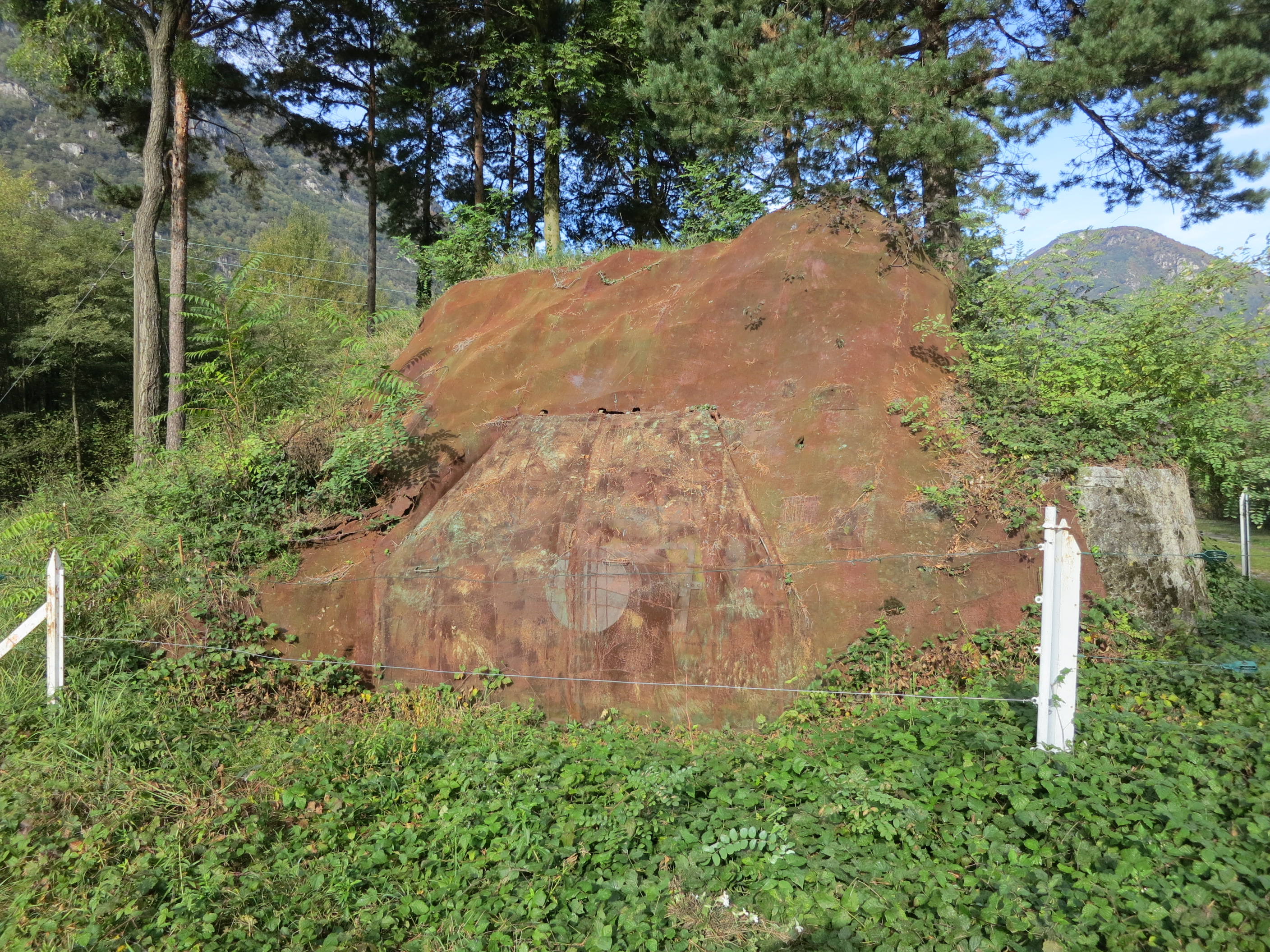 Artilleriewerk Lona, Iragna TI, Schweiz